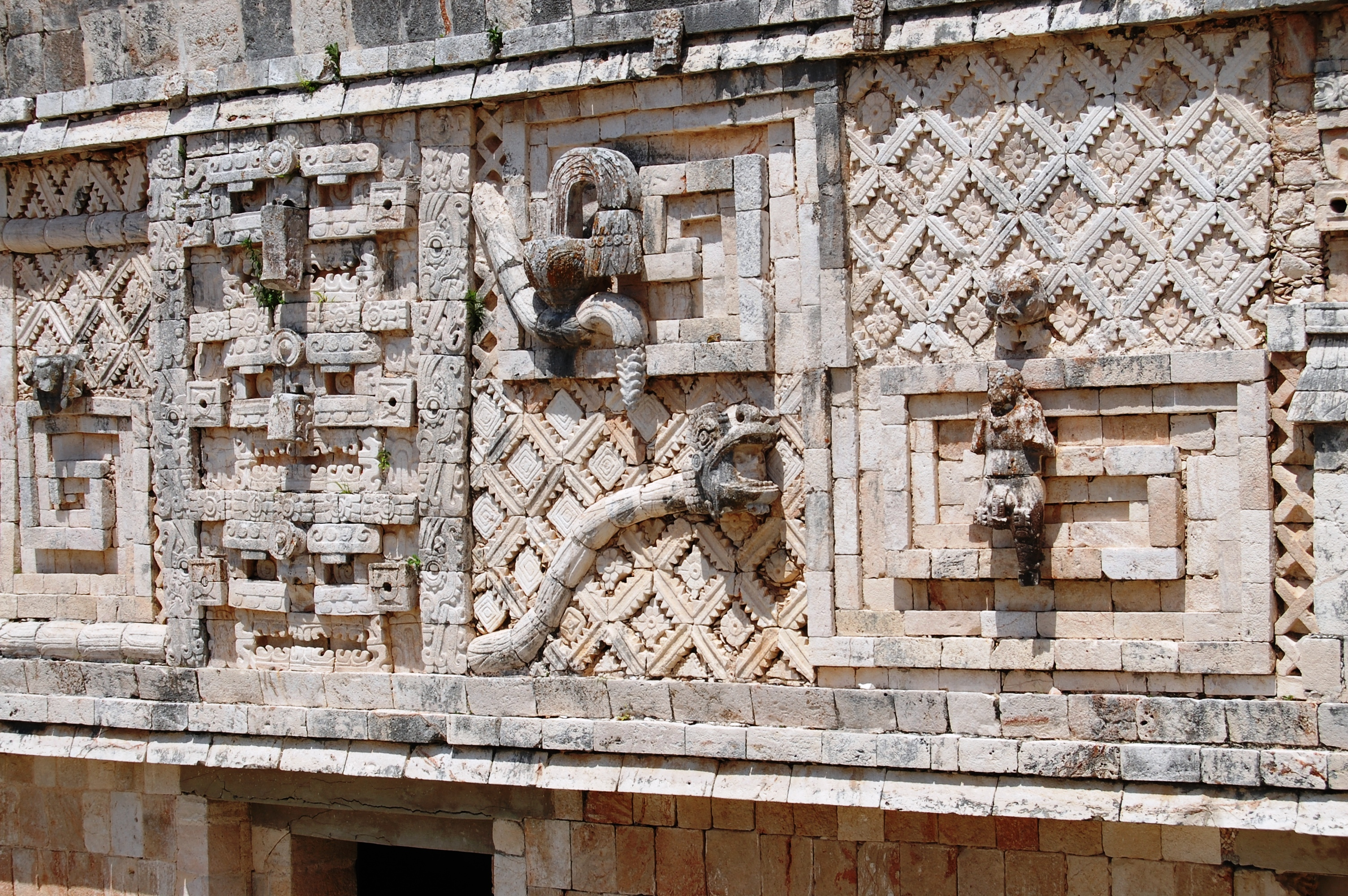 Uxmal, Mexico Cuadràngulo de las Monjas (detail)